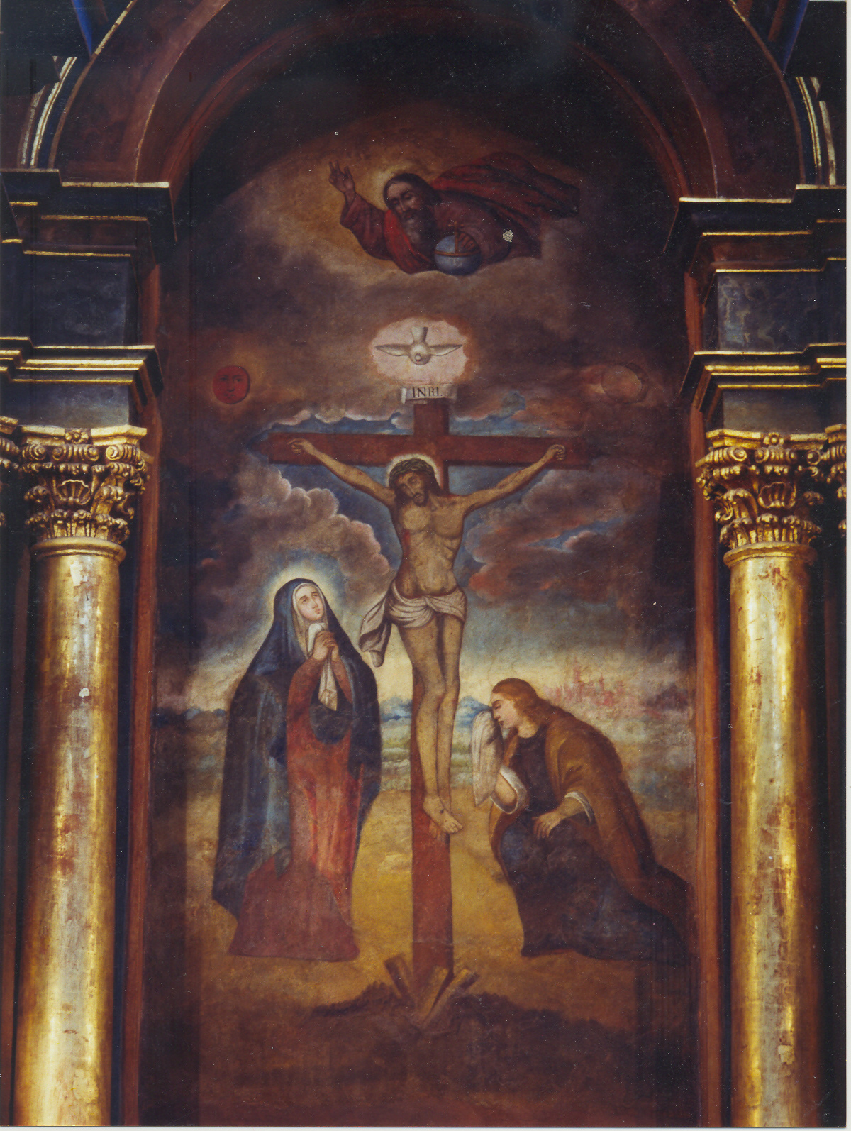 Mural Señor de los Milagros de Nazarenas (Lima) Lord of Miracles